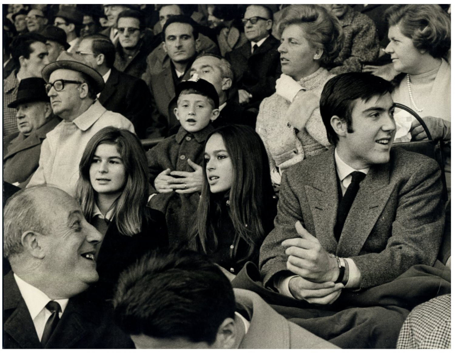 Guido Borghi negli anni sessanta del XX secolo